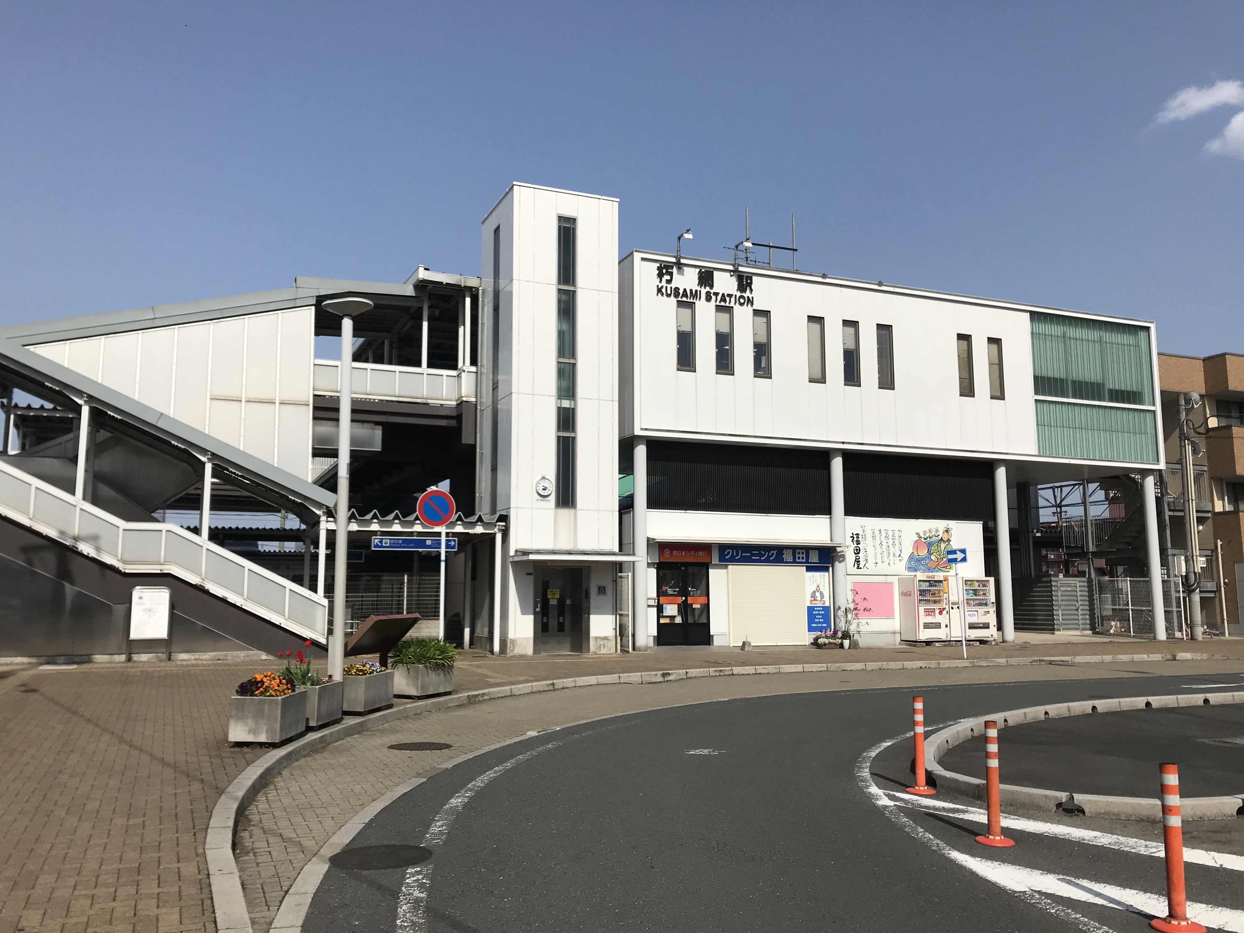 朽網駅の西口駅舎